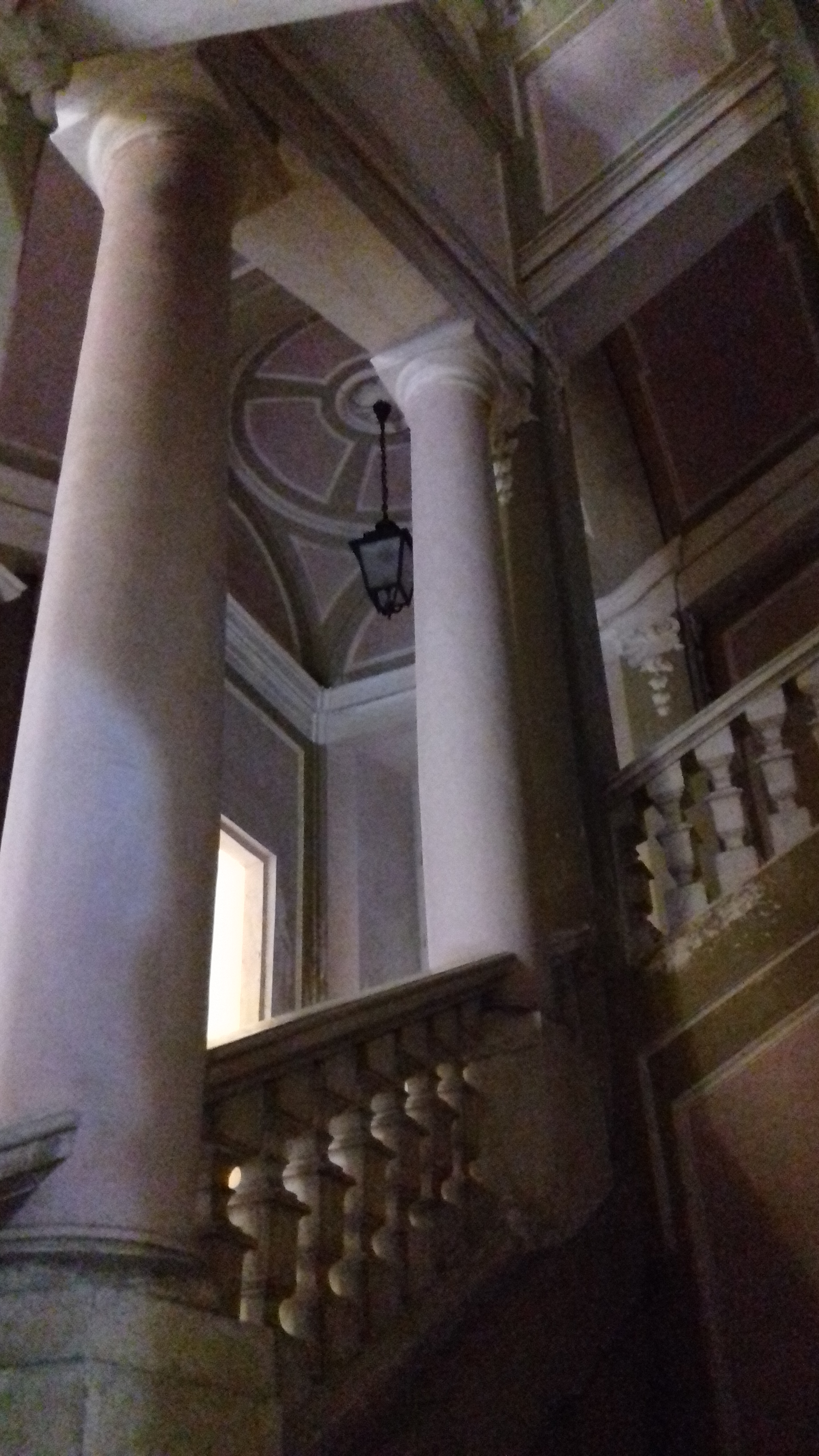 Lo scalone monumentale